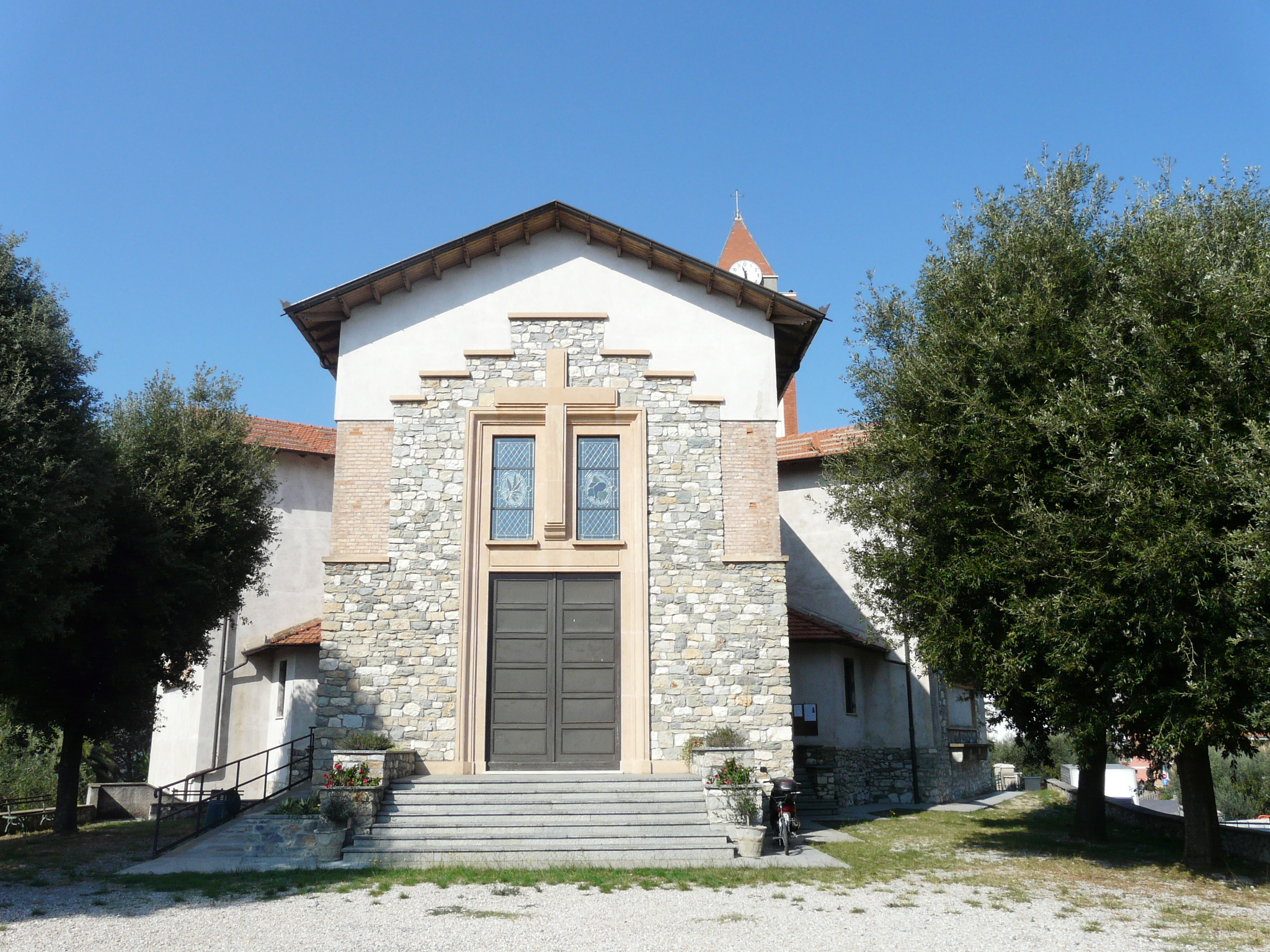 Chiesa di San Bartolomeo, Gorra, Finale Ligure, Liguria, Italia